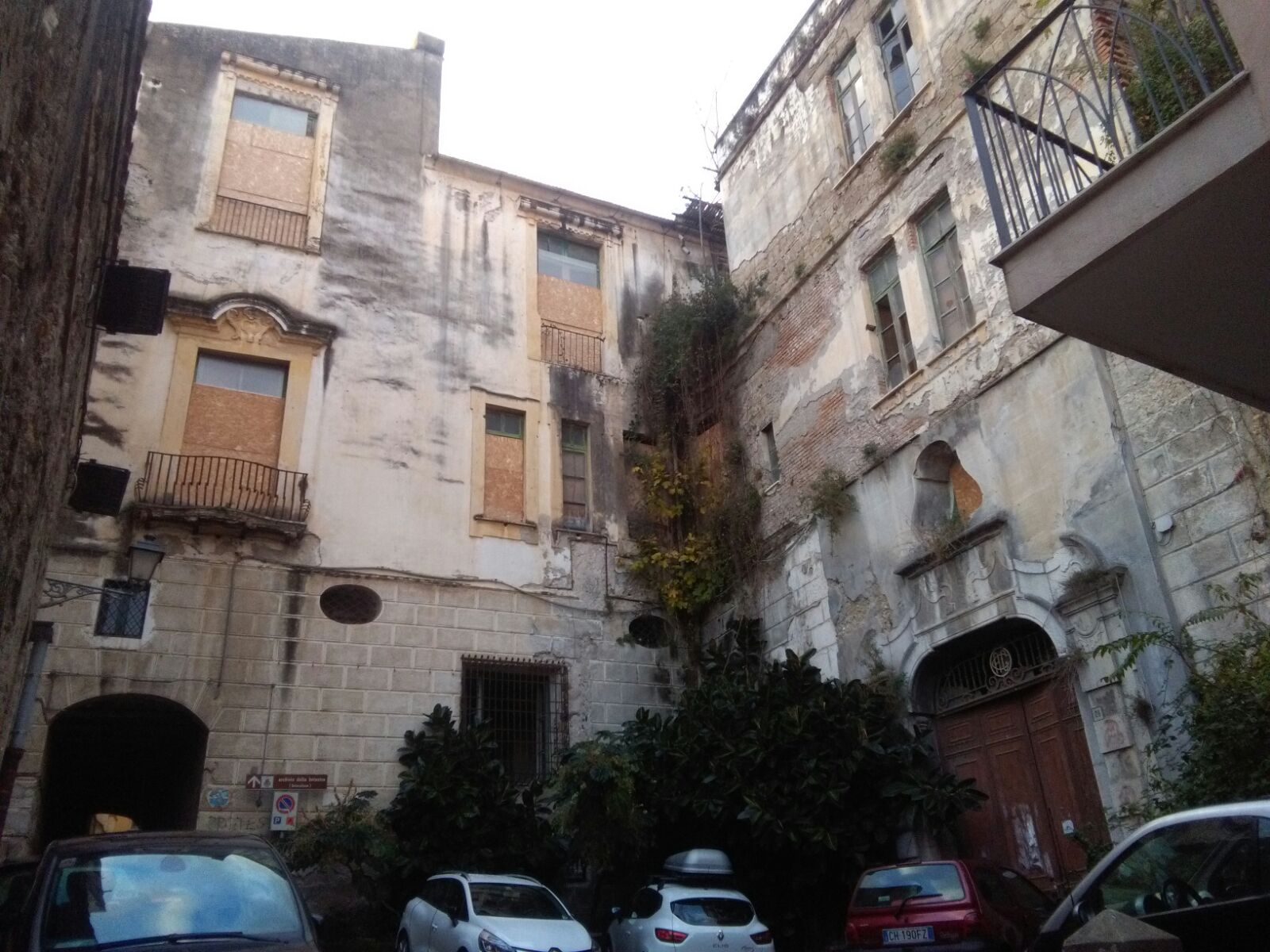 Ingresso e portone del Palazzo San Massimo di Salerno, ex Convitto e Liceo Artistico Andrea Sabatini